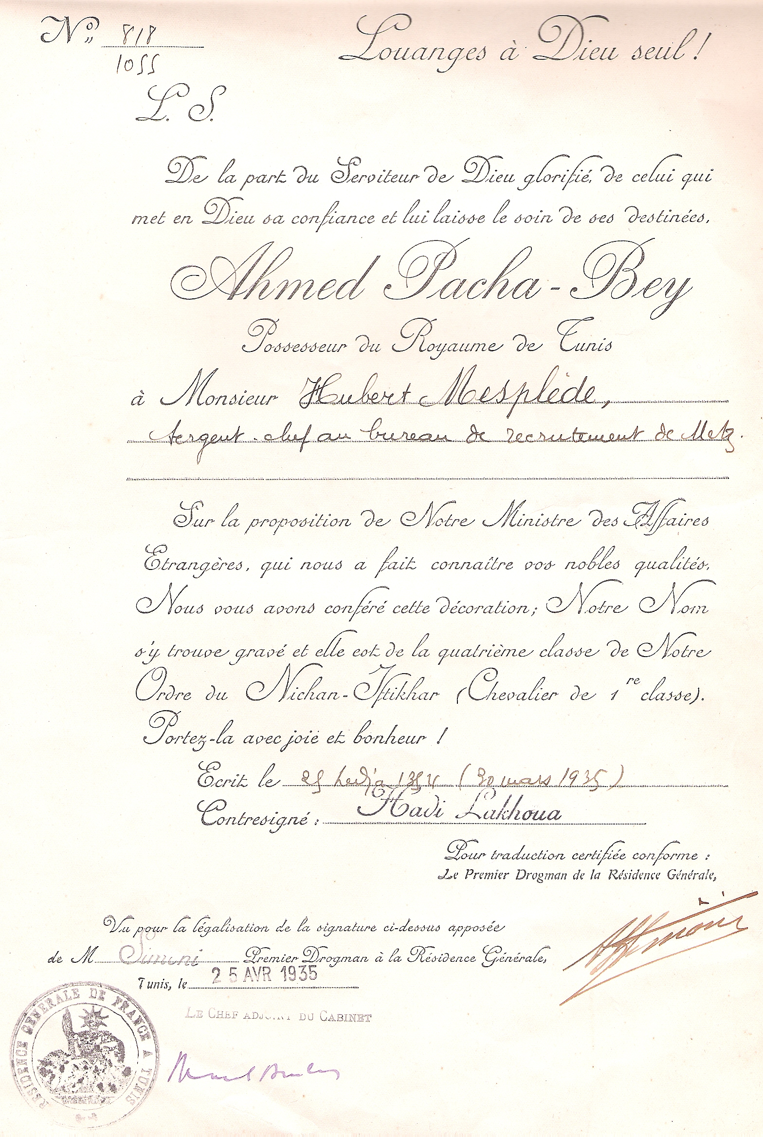 Description Médaille nichan-Iftikar (Mespléde hubert) Date1935 TunisieSourceSelf-photographedAuthorfantassin 72Permission (Reusing this file) libre de droit Médaille nichan-Iftikar (Mespléde hubert)